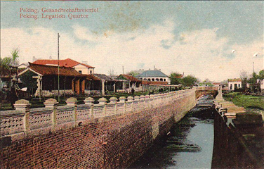 清代明信片北京使馆区御河（今正义路）